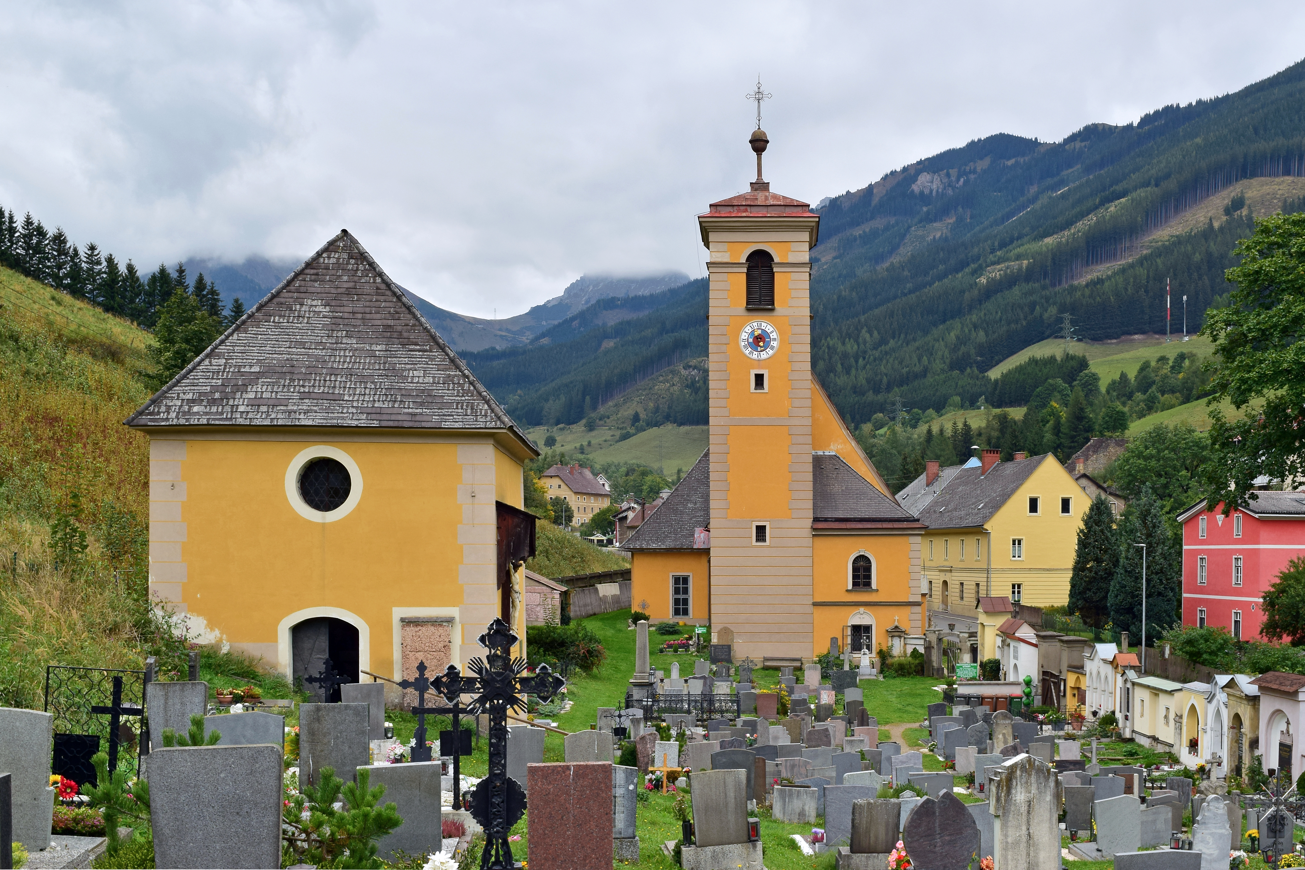 Kath. Pfarrkirche Maria Himmelfahrt und Figurenbildstöcke hll. Barbara und Florian